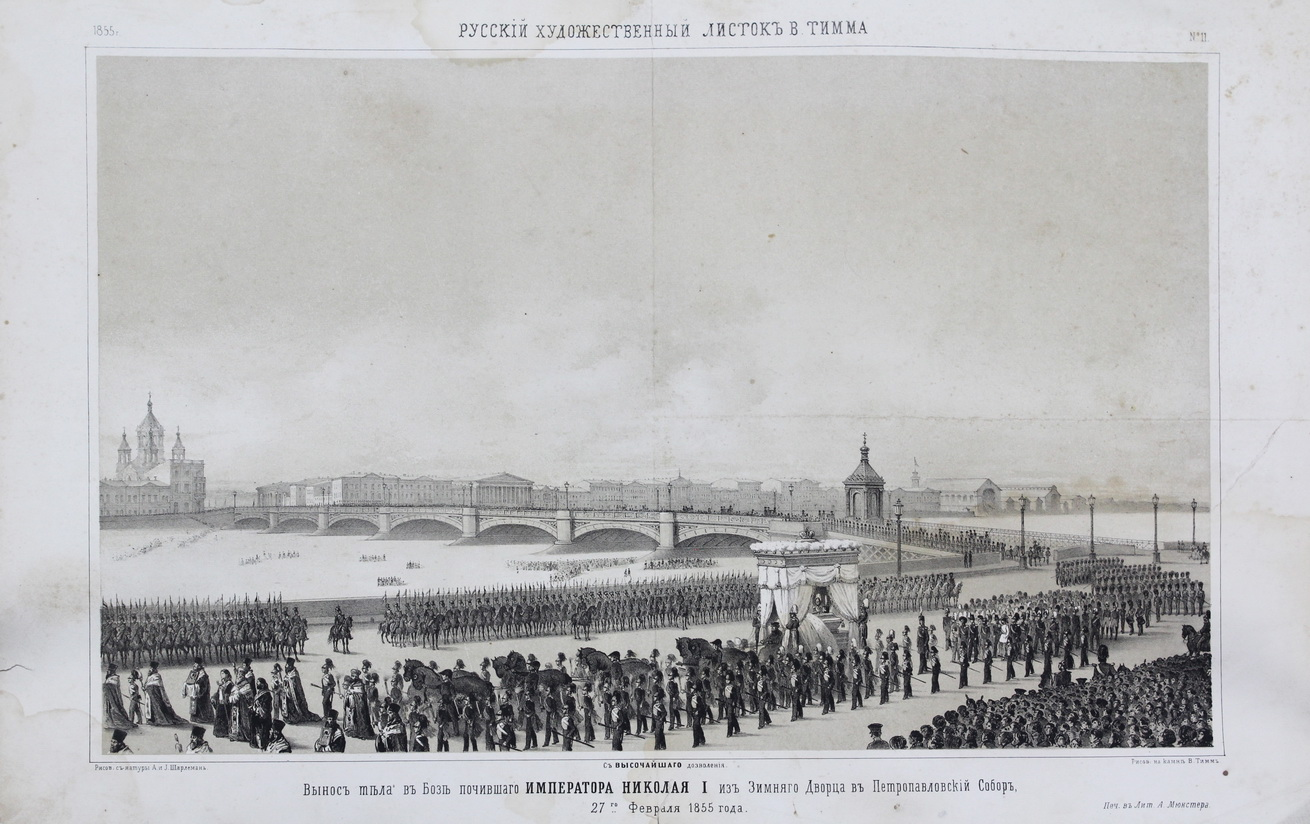 Тимм Василий Федорович. Вынос тела Николая I